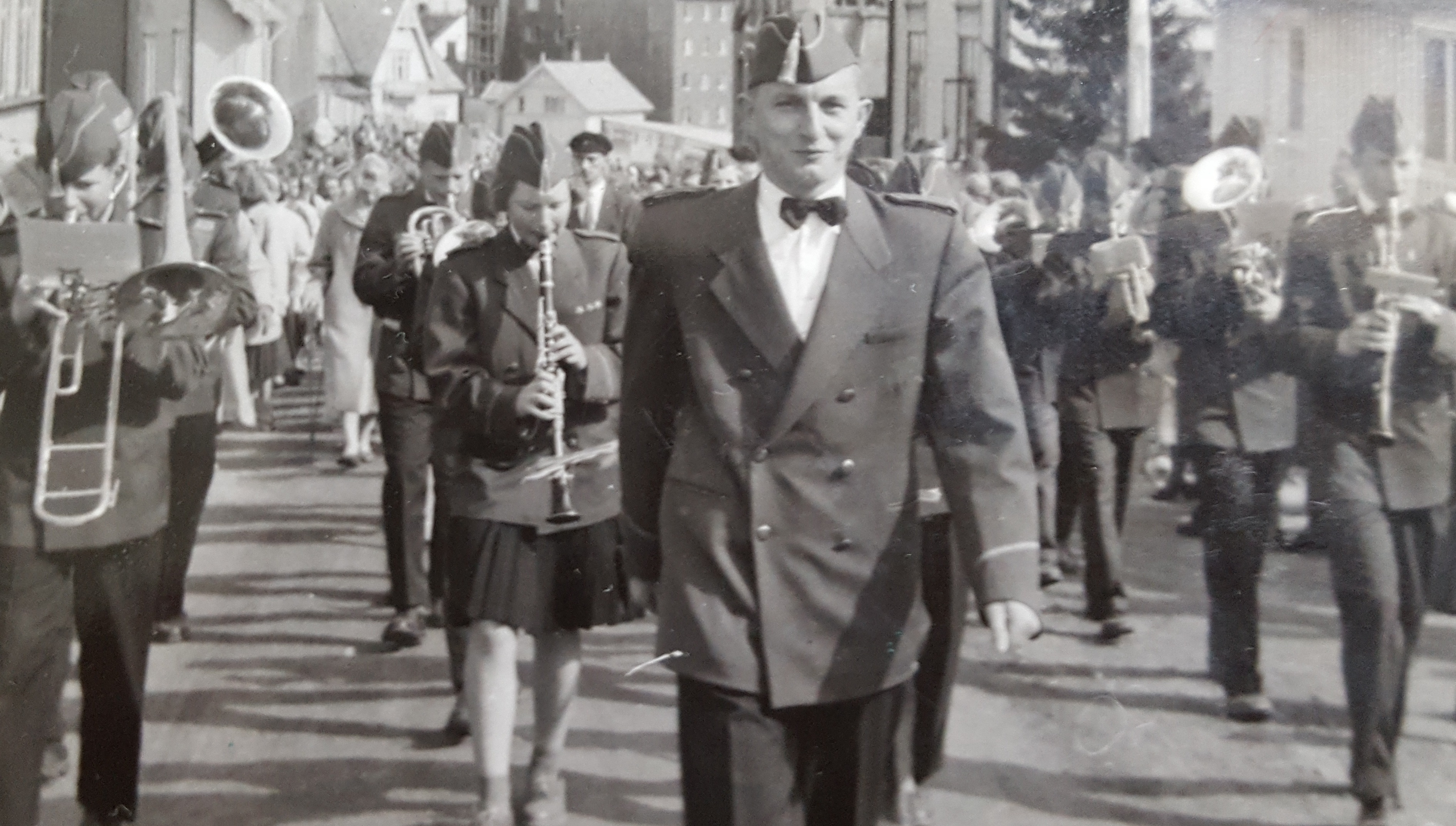 Svein Hauan leder an Harstad Folkeskoles Musikkorps